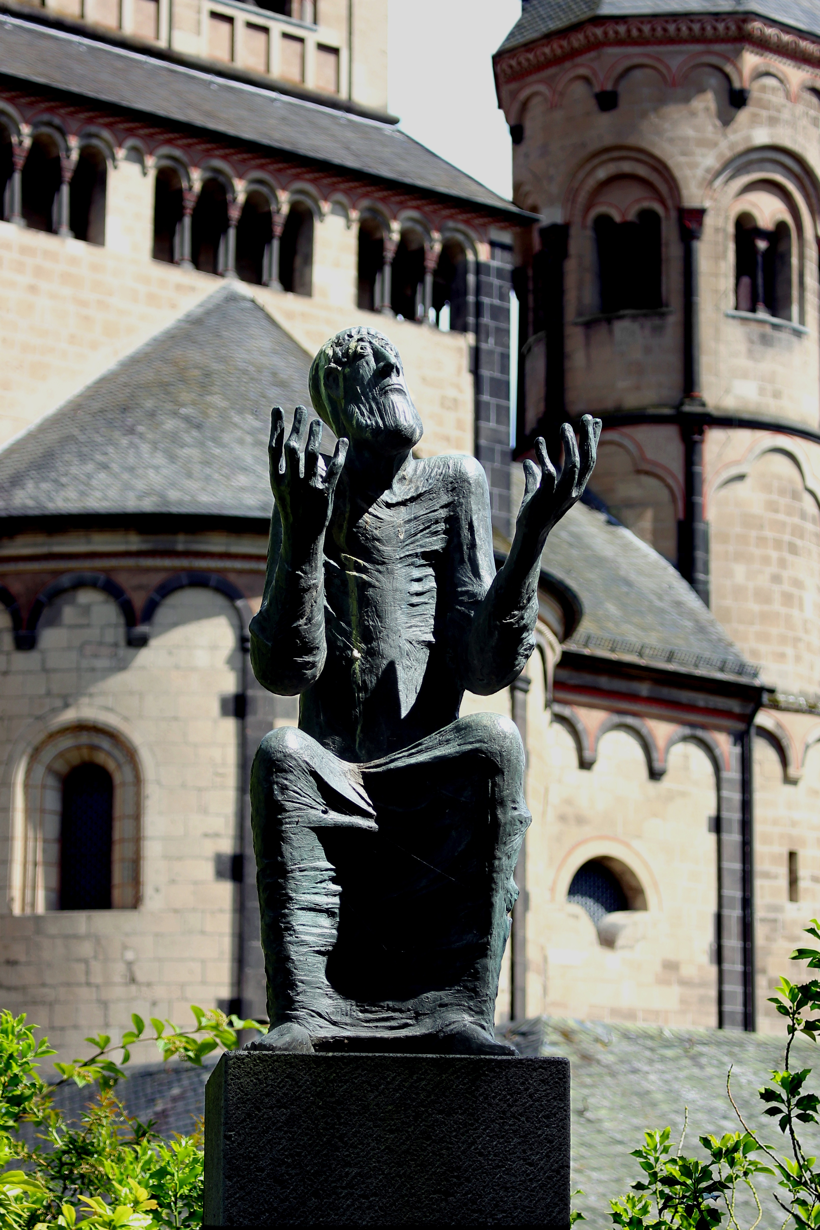 Prophet, Bronzestatue am Weg zur Abteikirche Maria Laach, Hildegard Bienen 1971 (2. Version mit geringfügig geändertem Ausschnitt)